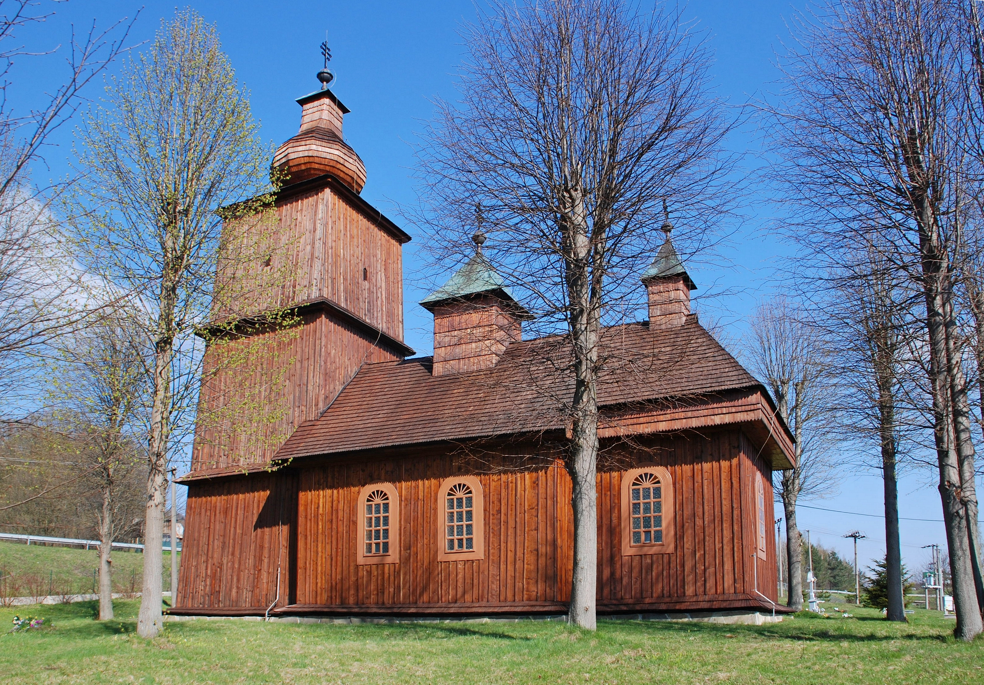 wieś Vyšný Komárnik